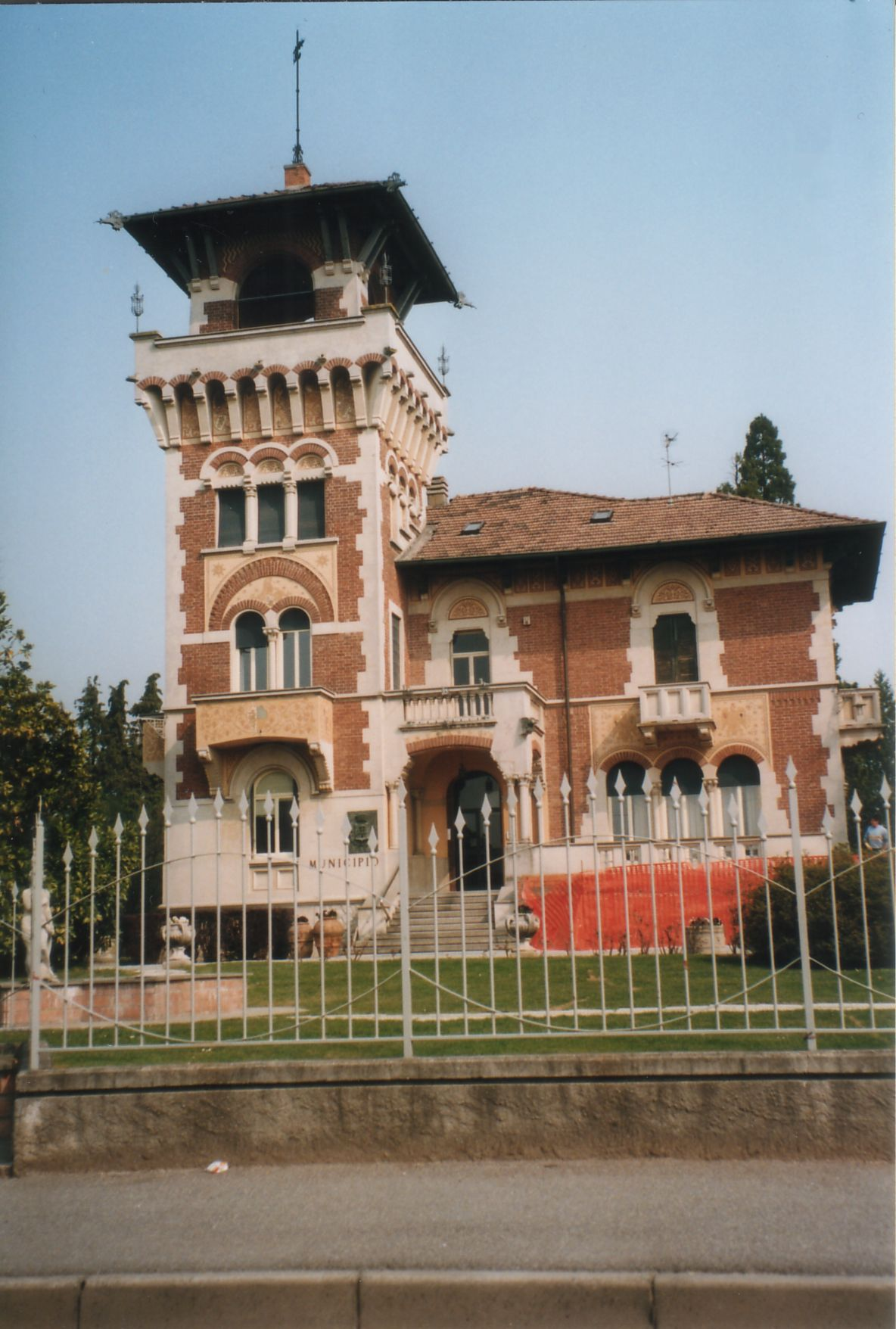 Municipio di Ronco Briantino